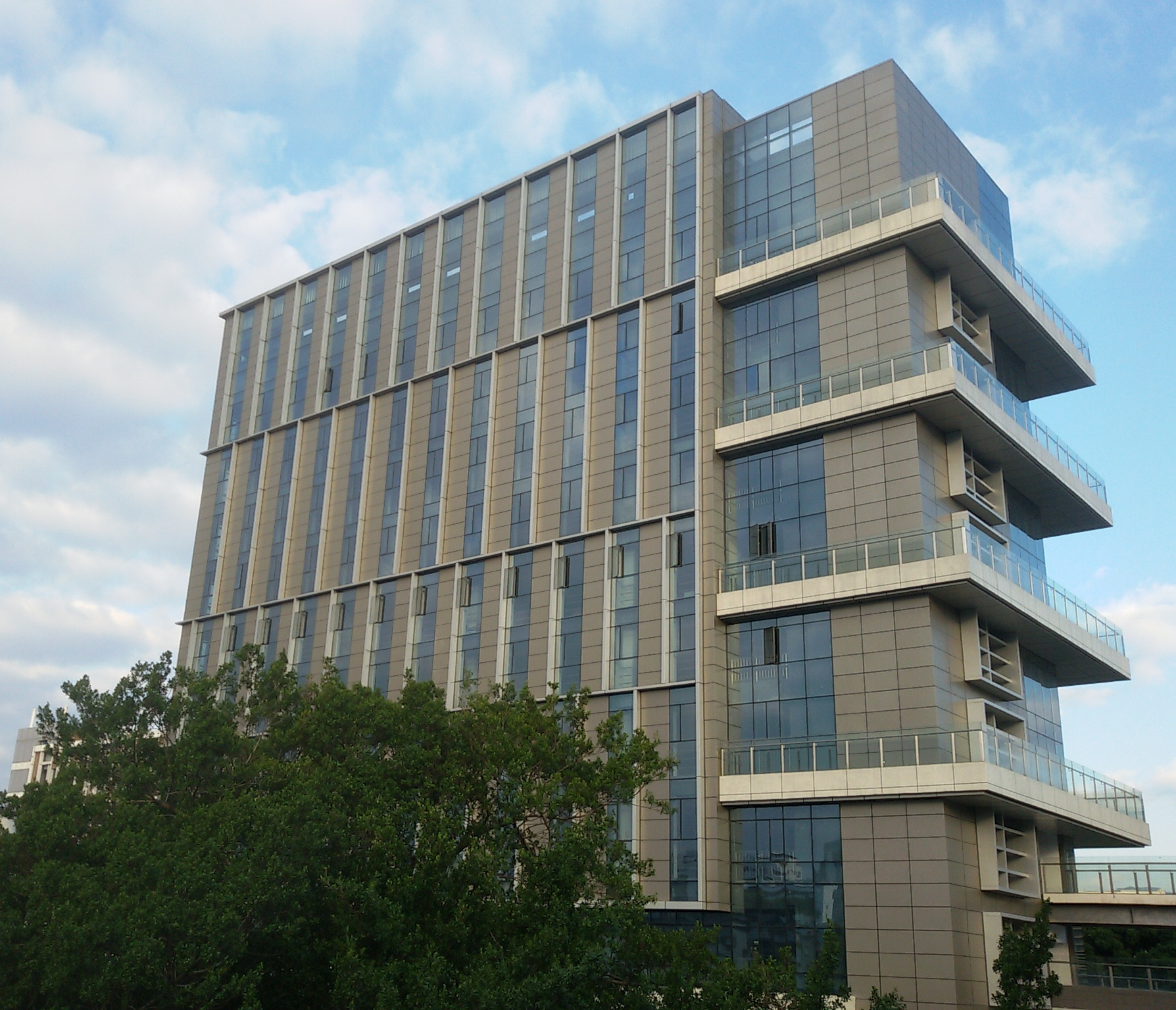 文言: 福州第三中學力行樓。學館也。西曆二零一一年始建。